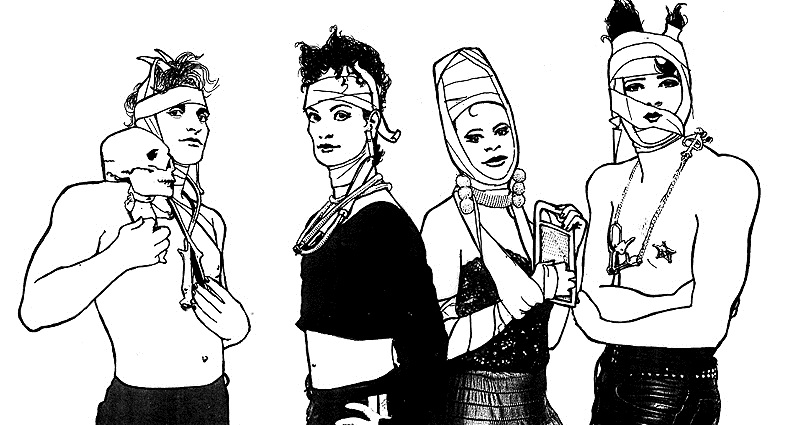 Tunten WG von 1994 wurde 2002 im Film "Tunten lügen nicht" von Rosa von Praunheim dokumentiert. Von links nach rechts: Ichgola Androgyn, Ovo Maltine, Tima die Göttliche und BeV StroganoV. Zeichnung L. Wekenborg